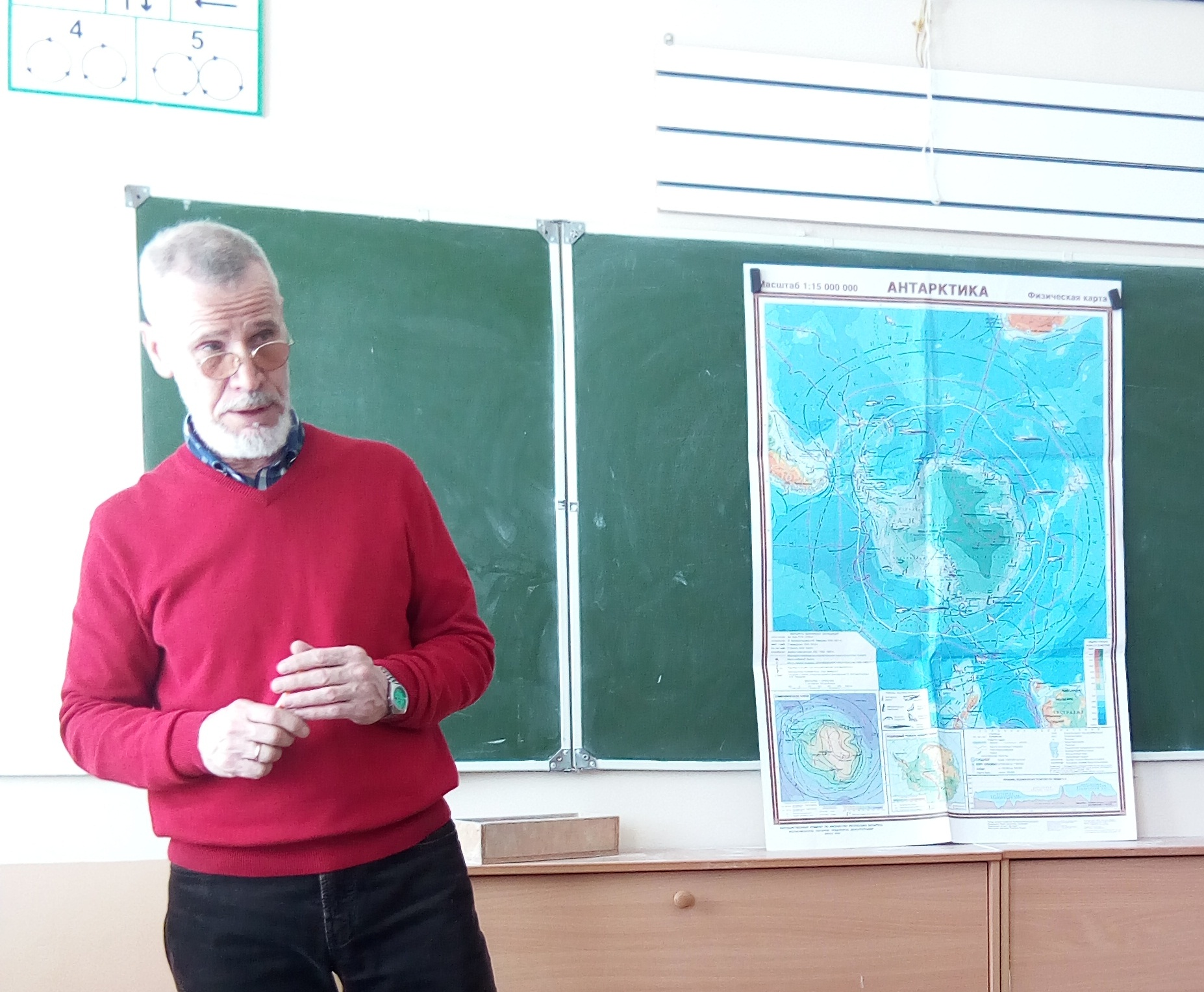 Беларускі палярны даследчык Аляксей Гайдашоў чытае лекцыю па вяртанні з палярнай экспедыцыі, 2018